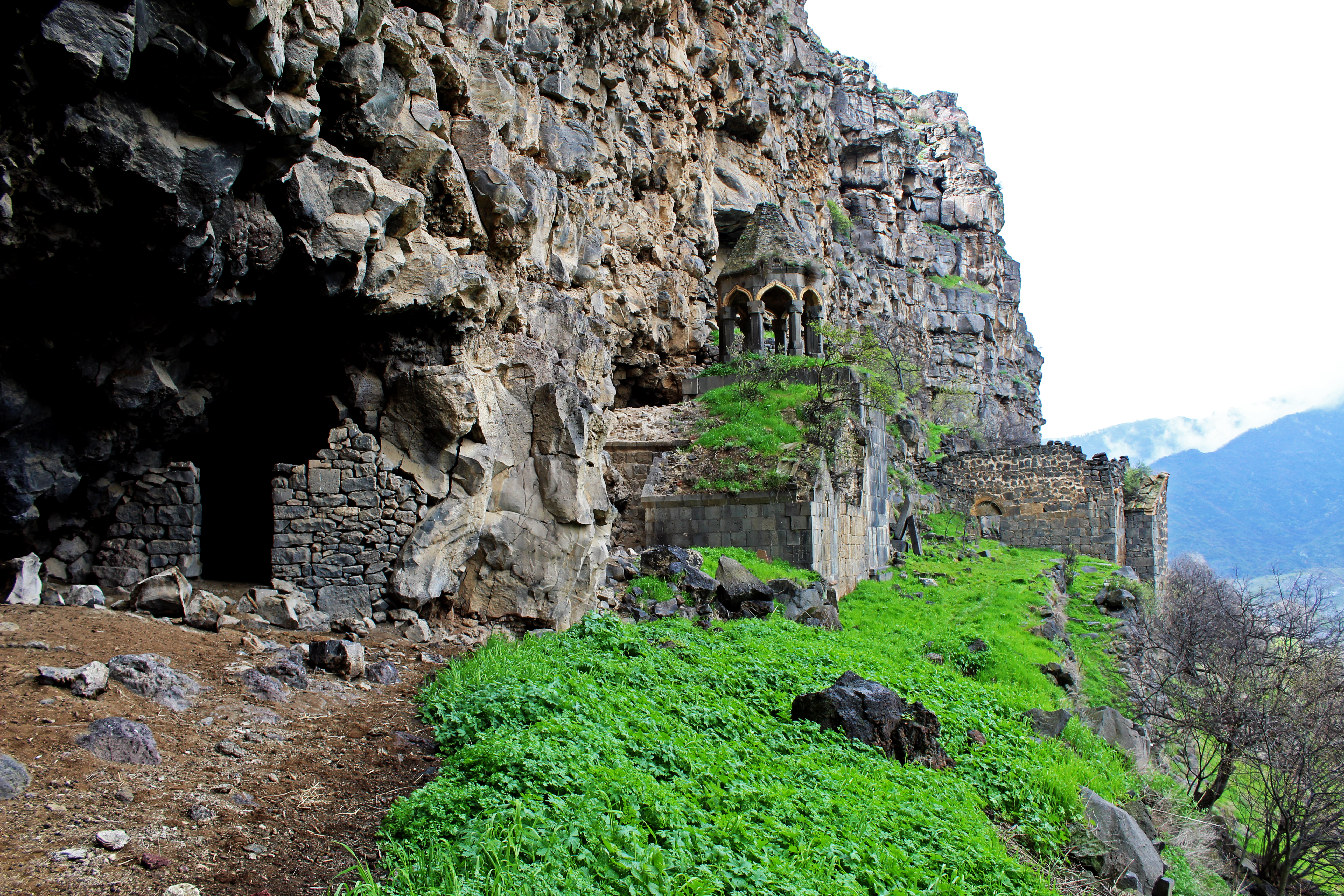 Հոռոմայրի ստորին հուշարձանախումբ, հայտնի է նաև Ձորամիջի վանք անվամբ